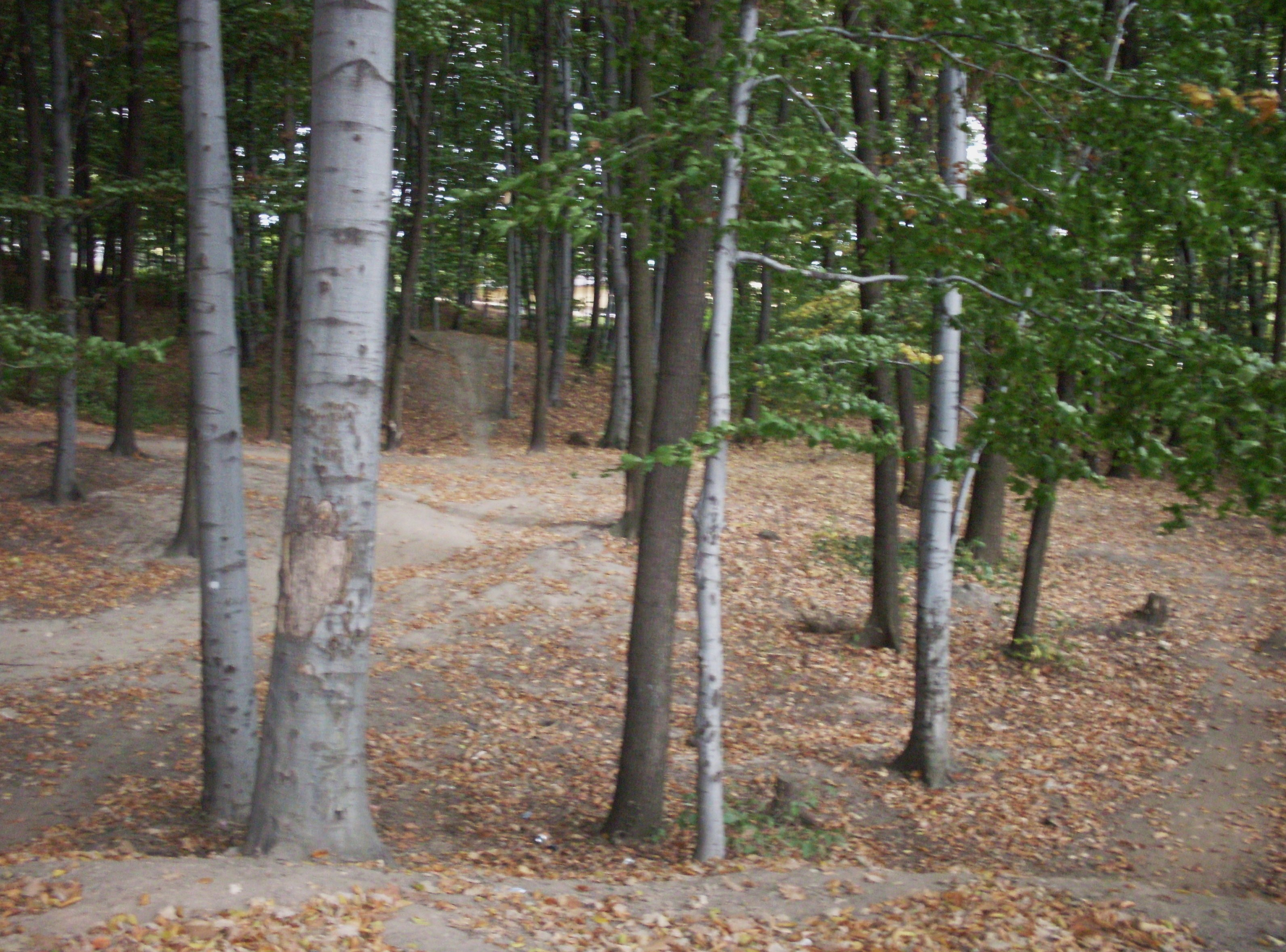 D.kopalnia Adam w Tenczynku